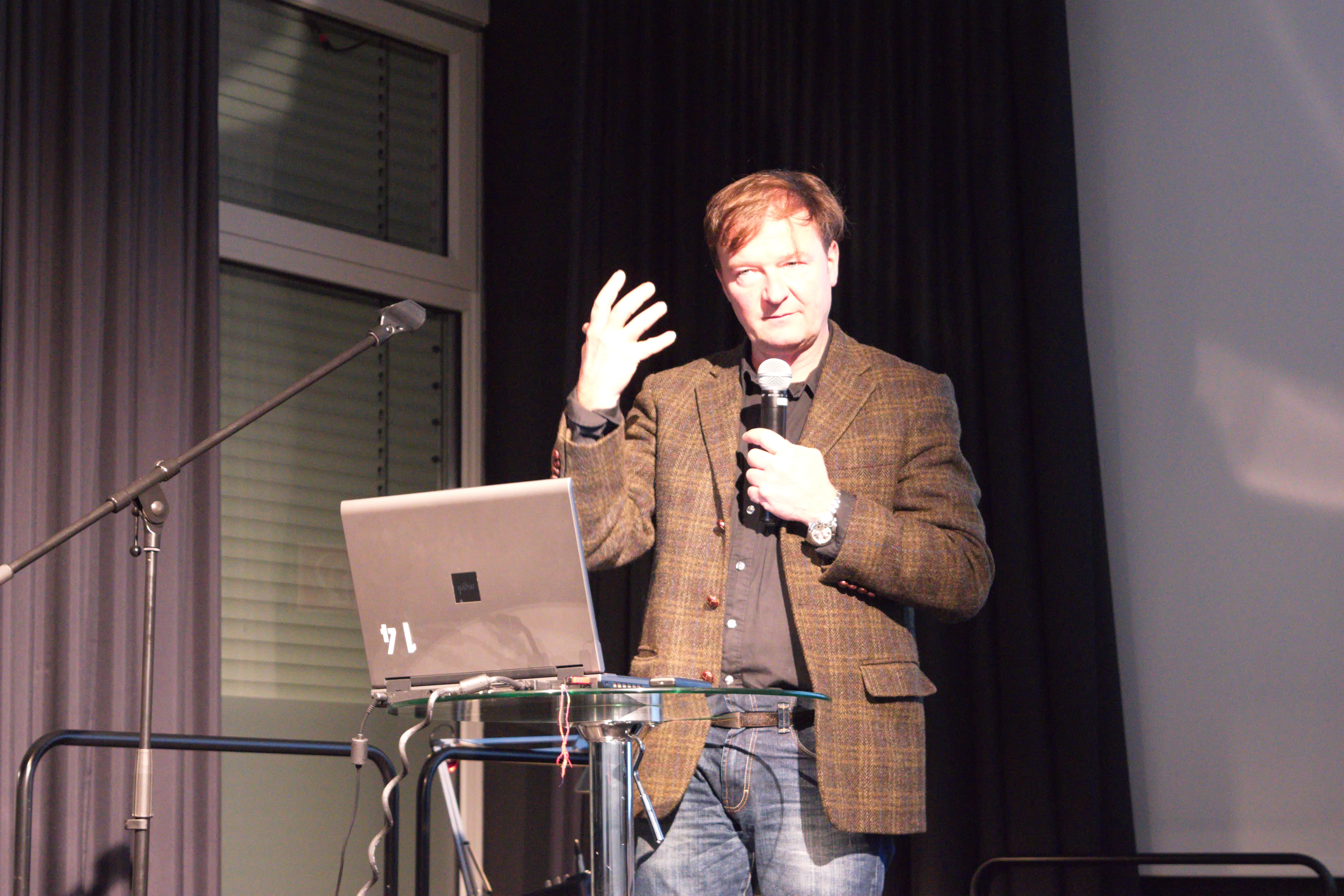 Politische Runde in der VHS: Gast Alexander Häusler (Fachhochschule Düsseldorf), Thema "Kulturkampf von rechts?" AfD & Co